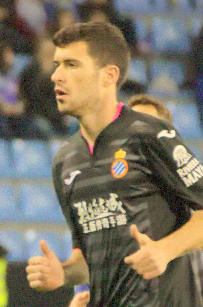 Aáron - Espanyol